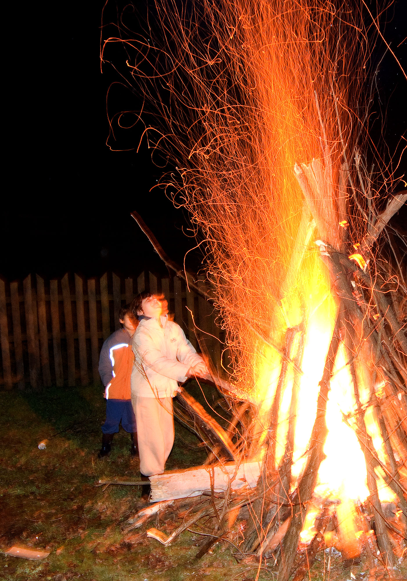 Паљење Бадњака у селу Јабланица код Горњег Милановца, 2009.